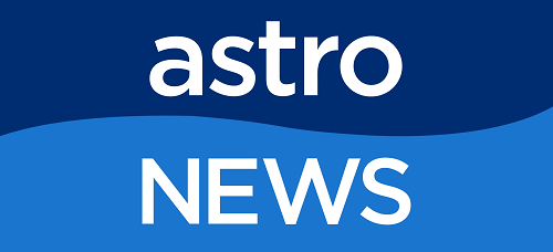 Logo saluran Astro News